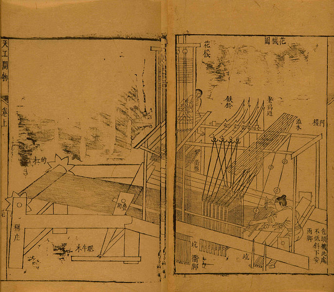 中文（香港）: 天工開物 花機圖